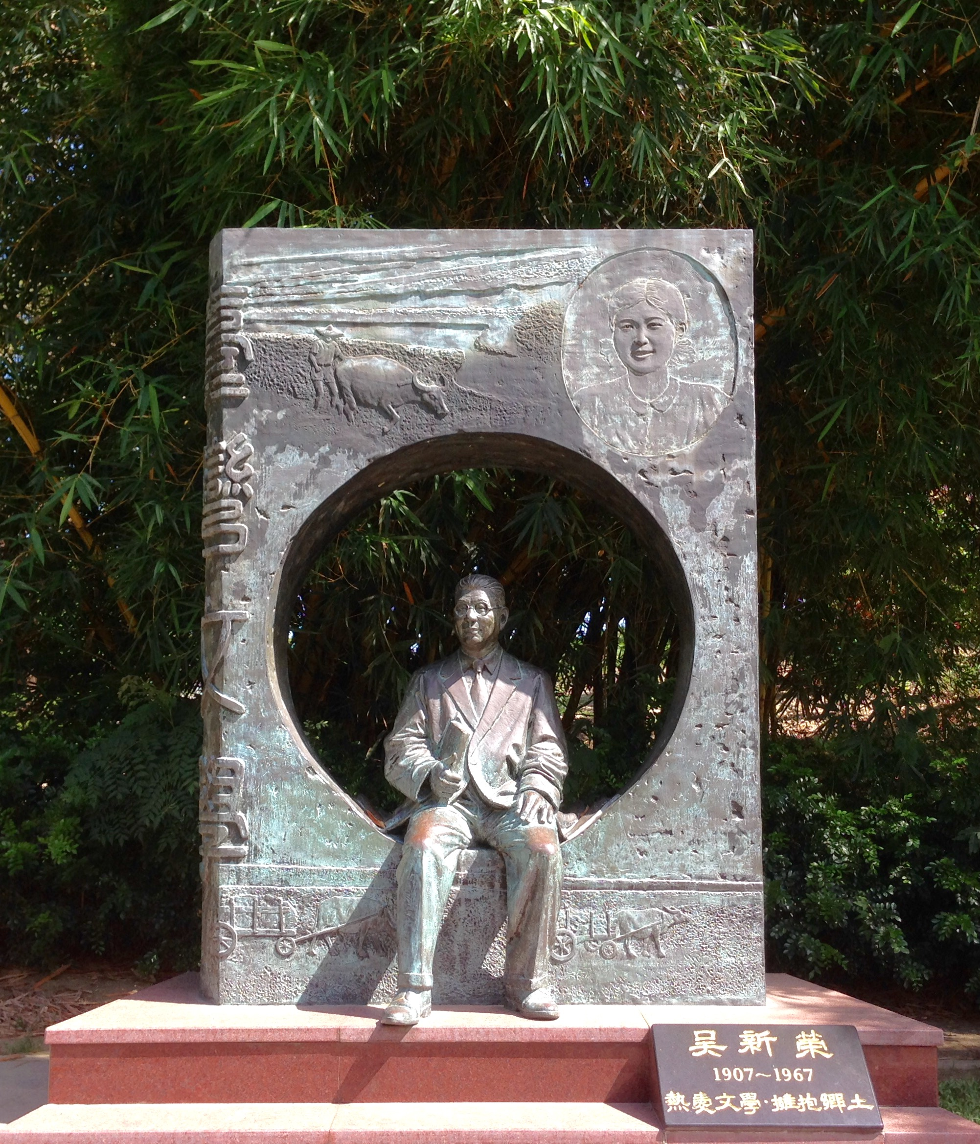 中文（台灣）: 吳新榮紀念像